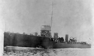 HMS Ariel